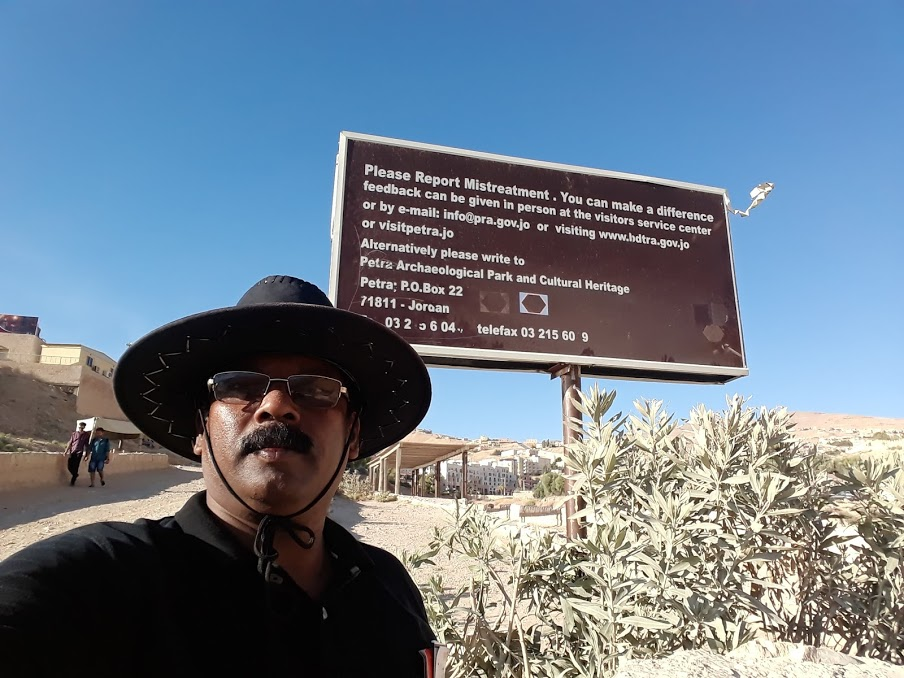 പെട്രയിലെ പ്രവേശനകവാടത്തിനടുത്തുള്ള സ്ഥലനാമ സൂചിക